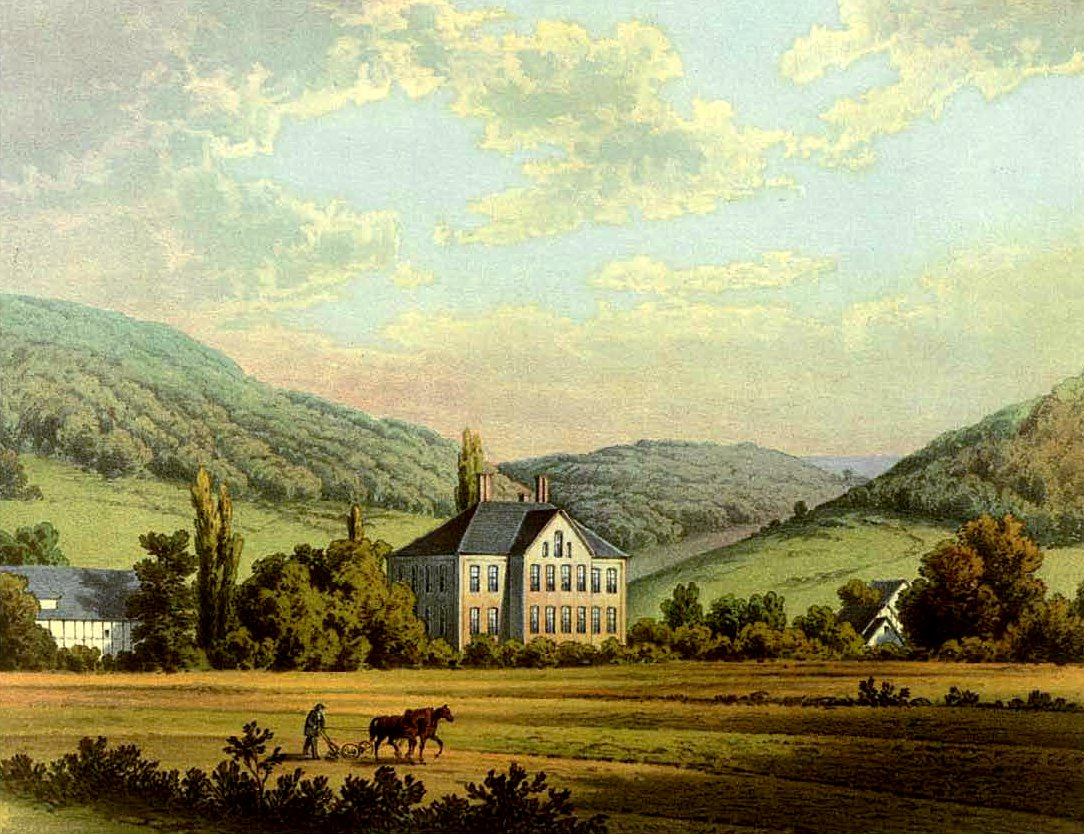 Schloss Maygadessen, denkmalgeschütztes Gebäude in Werl-Westönnen